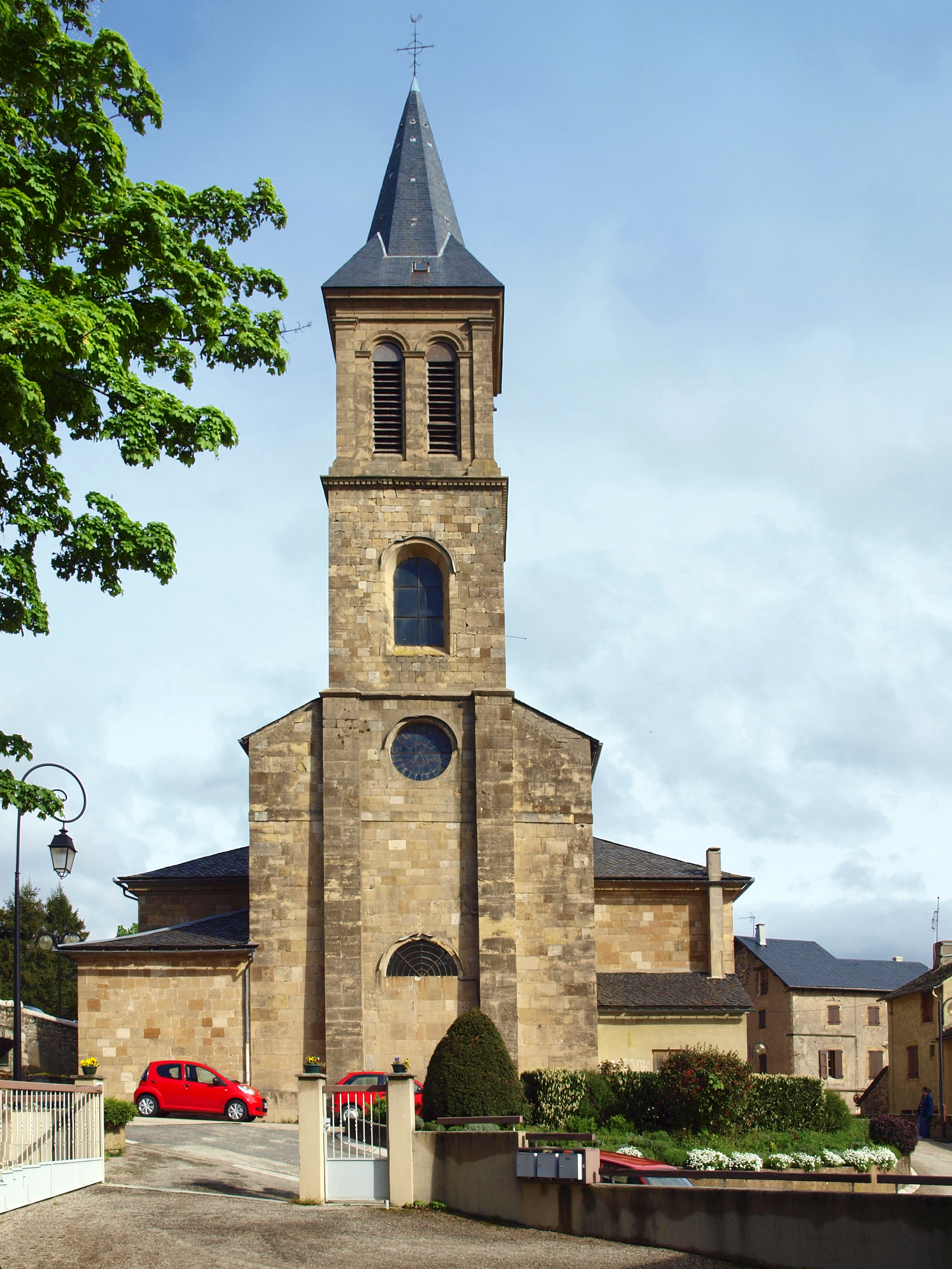 Florac (Lozère) - Chevet de l'église Saint-Martin